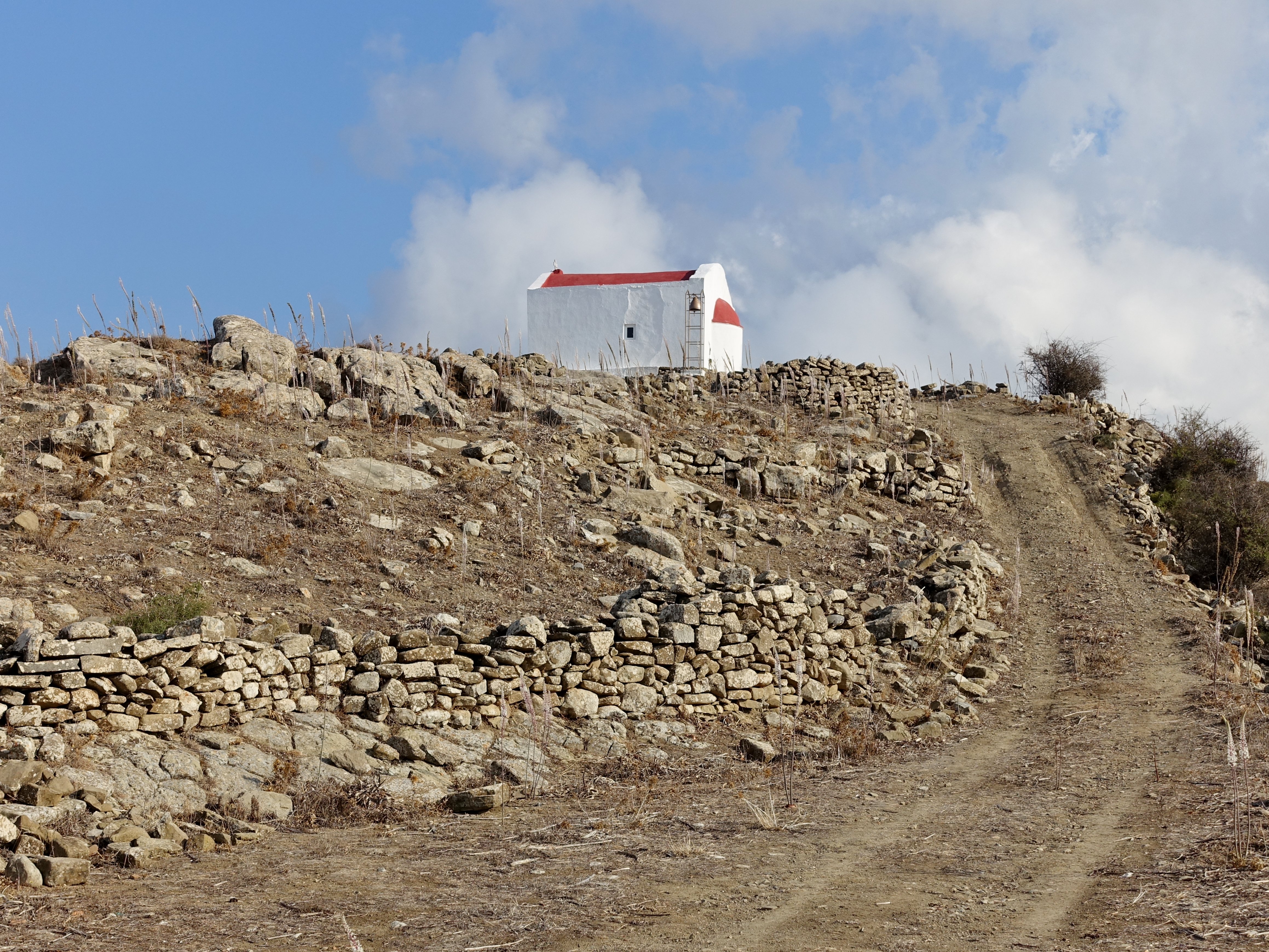 Blick auf die Kapelle Profitis Ilias (Προφήτης Ηλίας) bei Afrati (Αφράτι), Gemeinde Viannos, Regionalbezirk Iraklio, Kreta, Griechenland